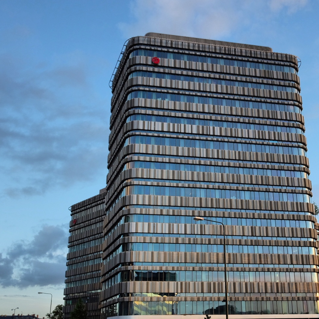 Niagara, Malmö högskola.